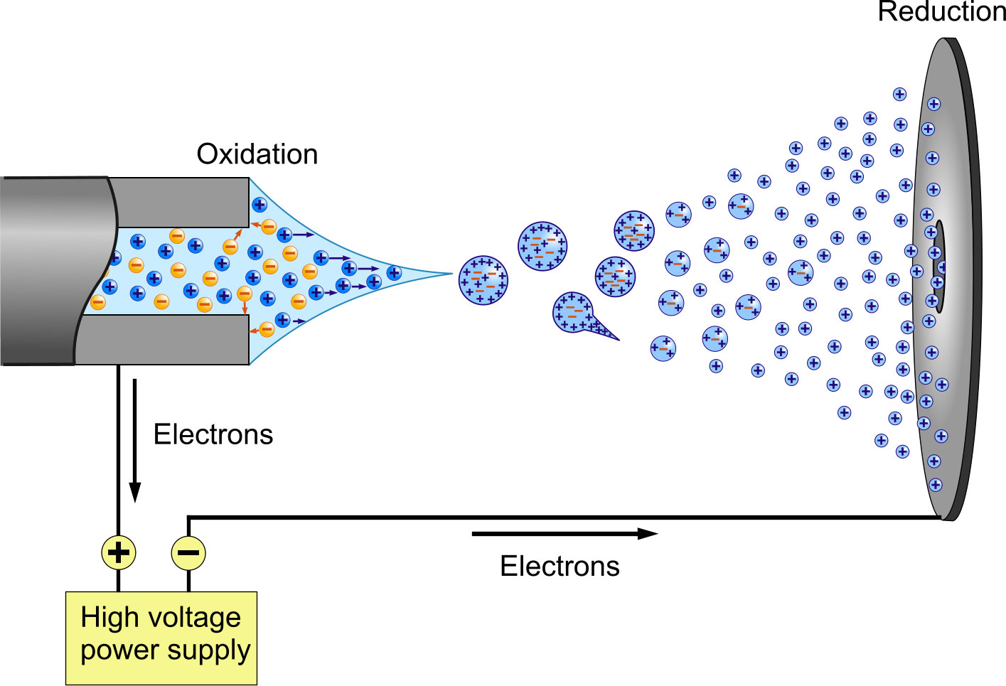 ESI positive mode